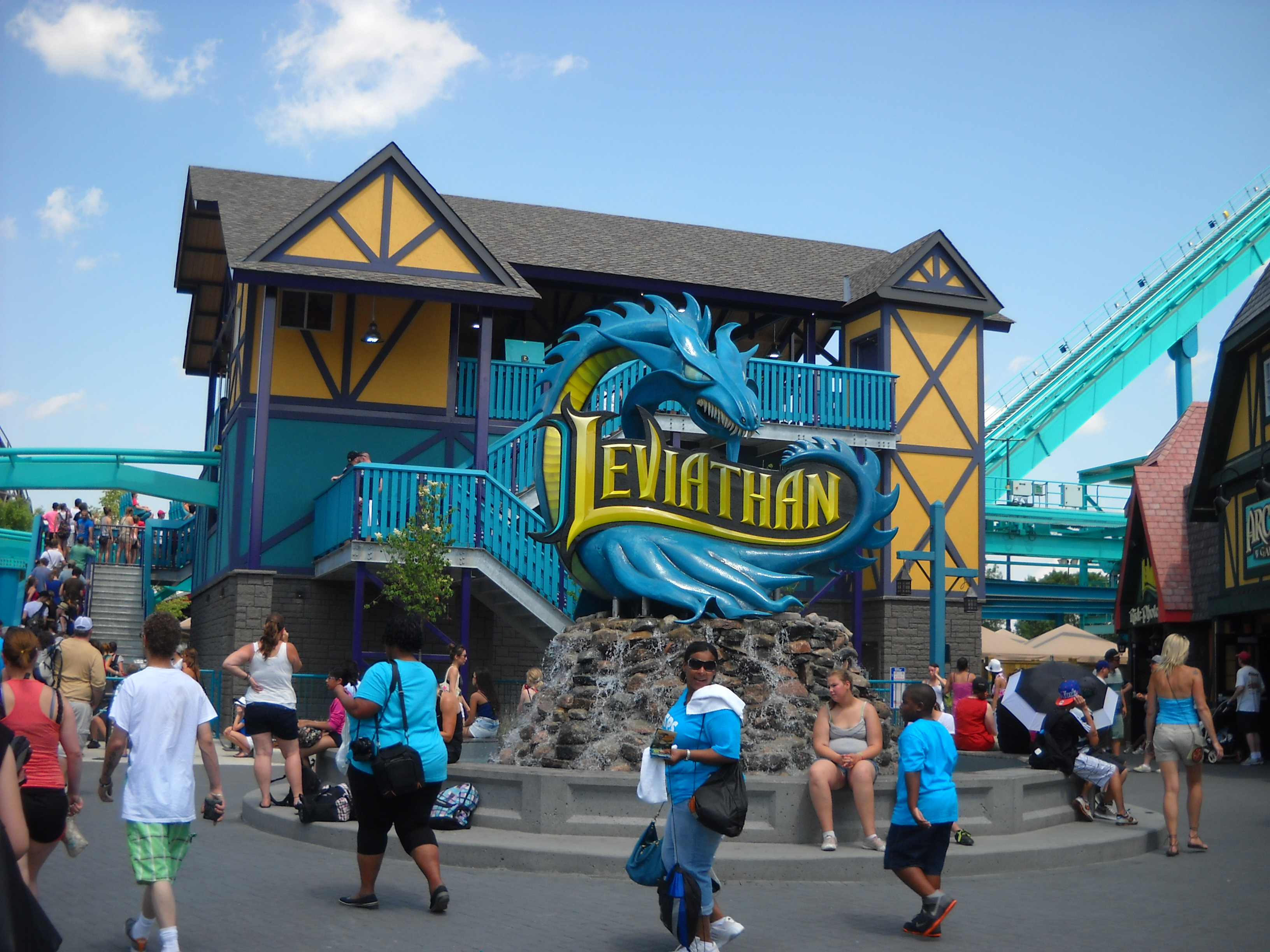 Essa atração é *muito* do mal. Montanha russa que separa os meninos(as) dos homens/mulheres.